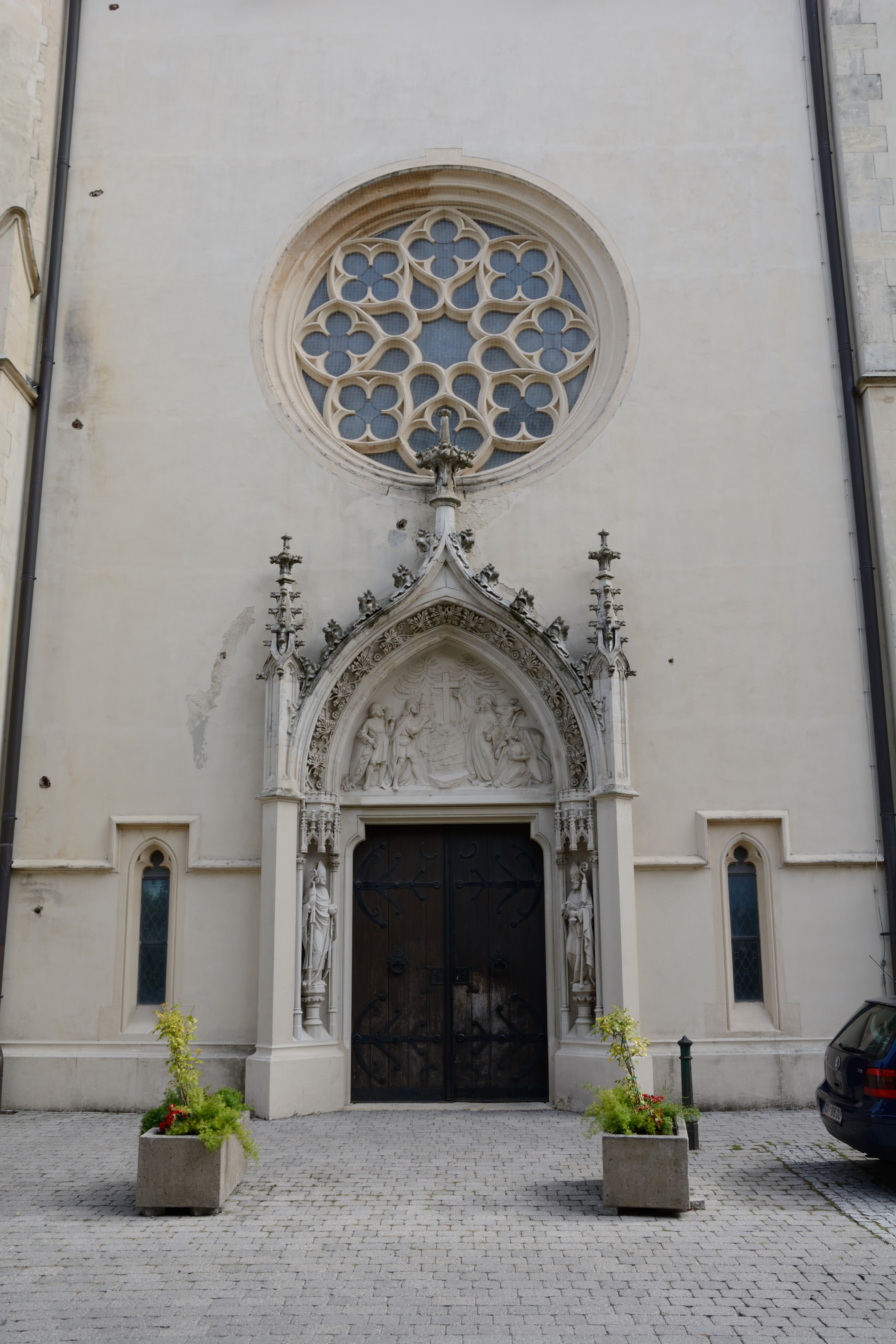 Kath. Pfarrkirche hl. Ägydius